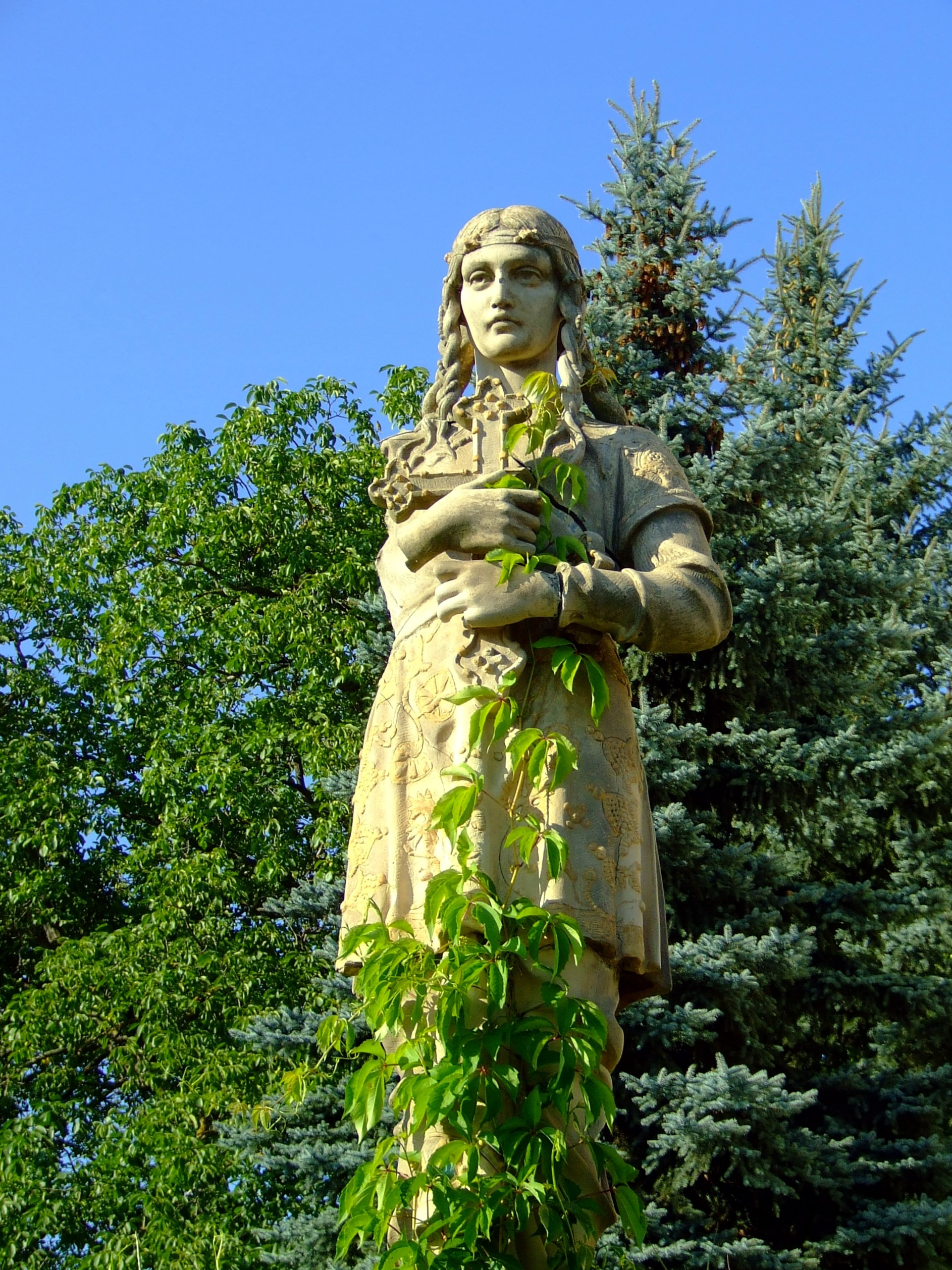 Szobor a máriakéméndi Nagyboldogasszony-templom előtt